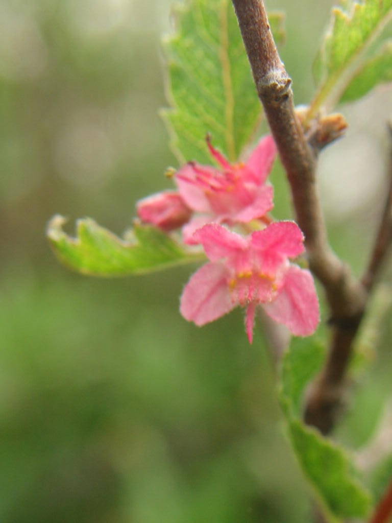 Arbusto palatable escaso, diezmado por las crianzas de cabras